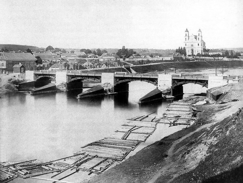 Зялёны мост у Вільні да 1890. Лёдарэзы па праекце Івана Іванавіча Лявіцкага